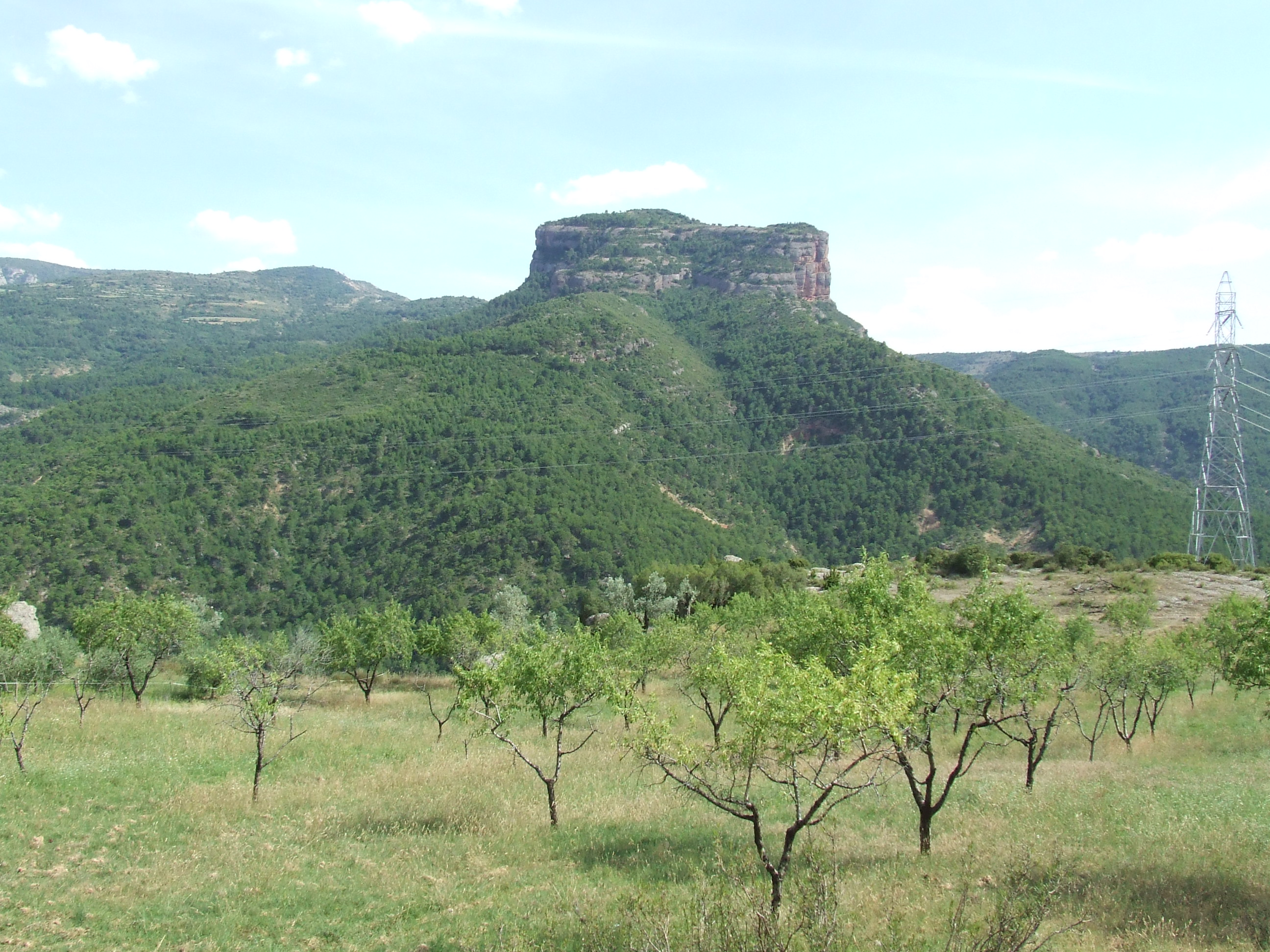 El Roc de Santa des del nord (Claverol, Conca de Dalt, Pallars Jussà)